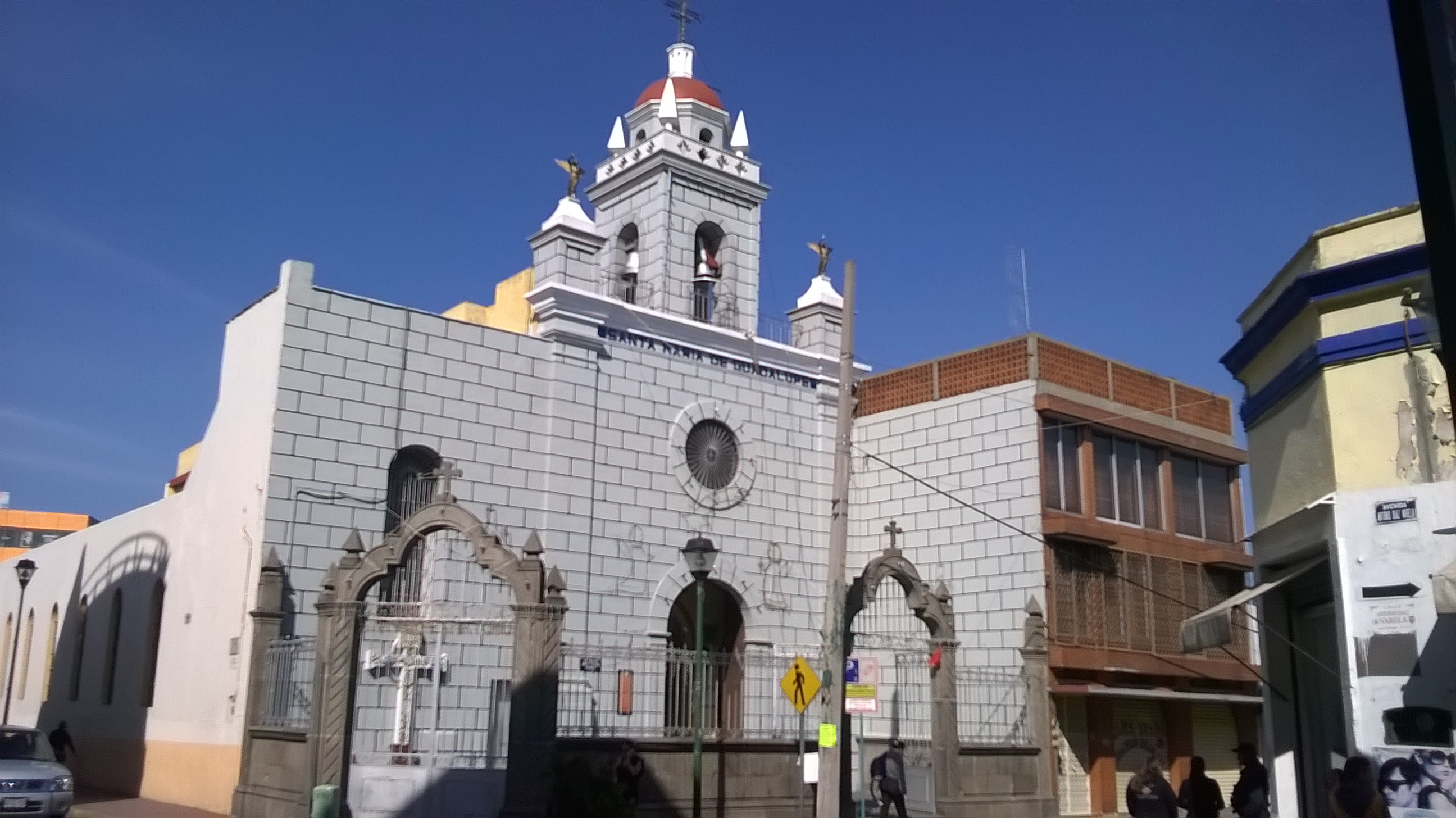 Iglesia de Guadalupe en Chiautempan, Tlaxcala